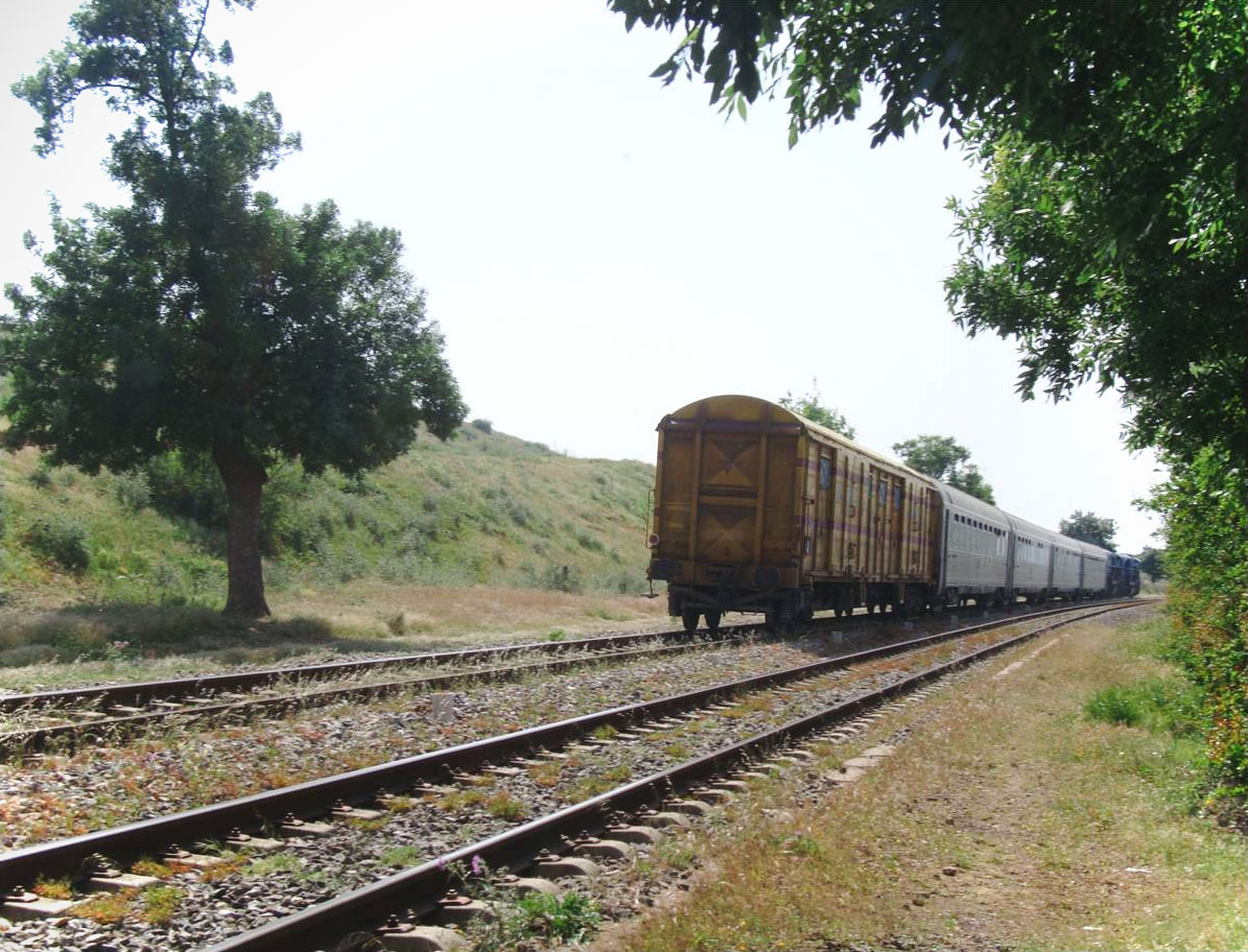 Train de marchandise se dirigeant à Chlef au passage d'Ouled Abbès